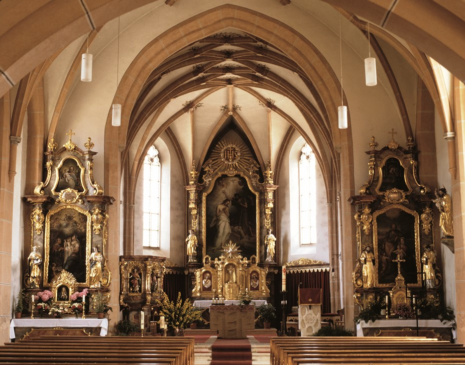 Kirche Mitterskirchen von innen